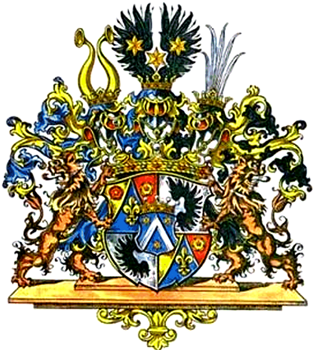 Wappen der Freiherrn von Fritsch von 1742